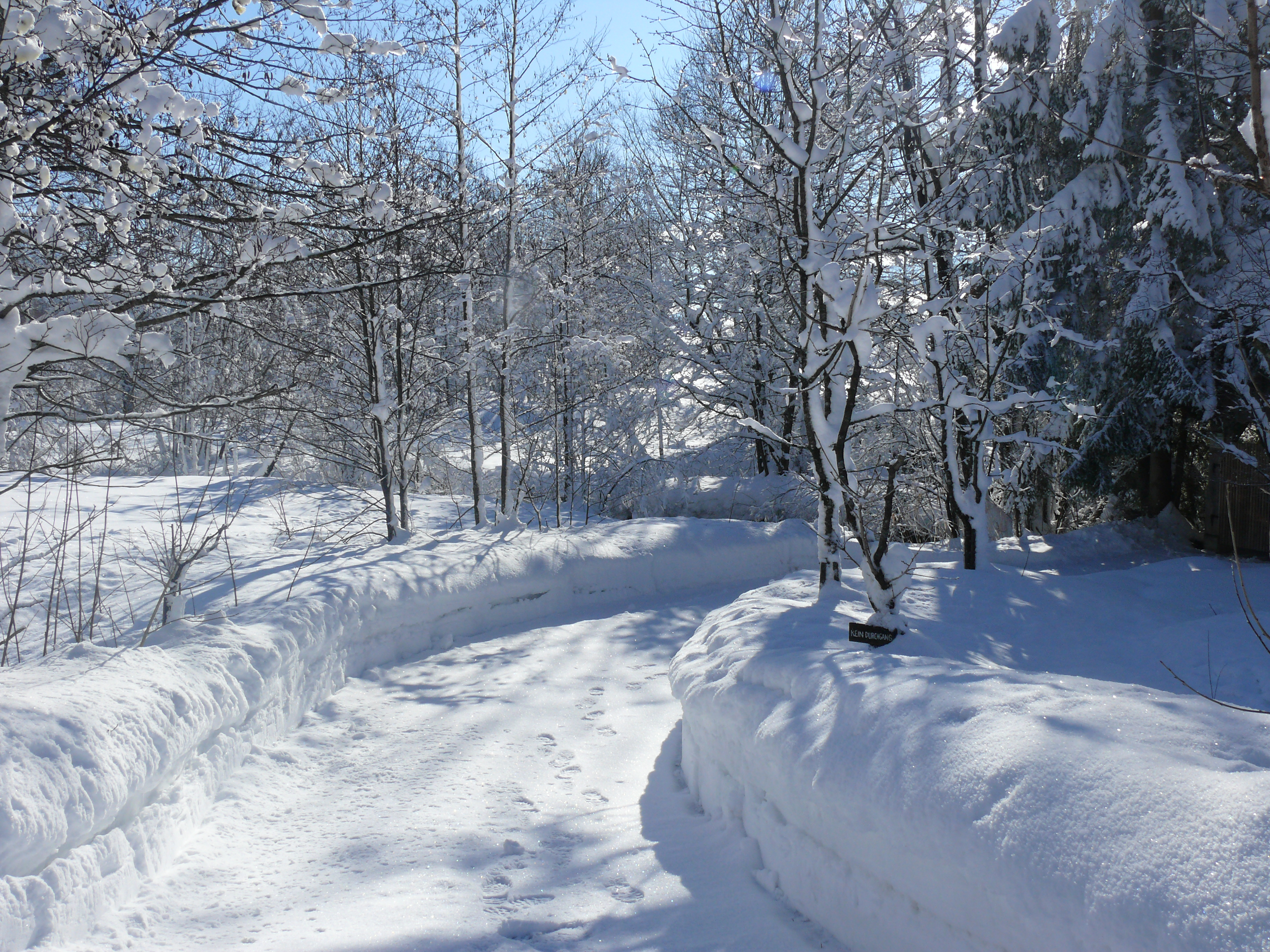 Winterwanderweg